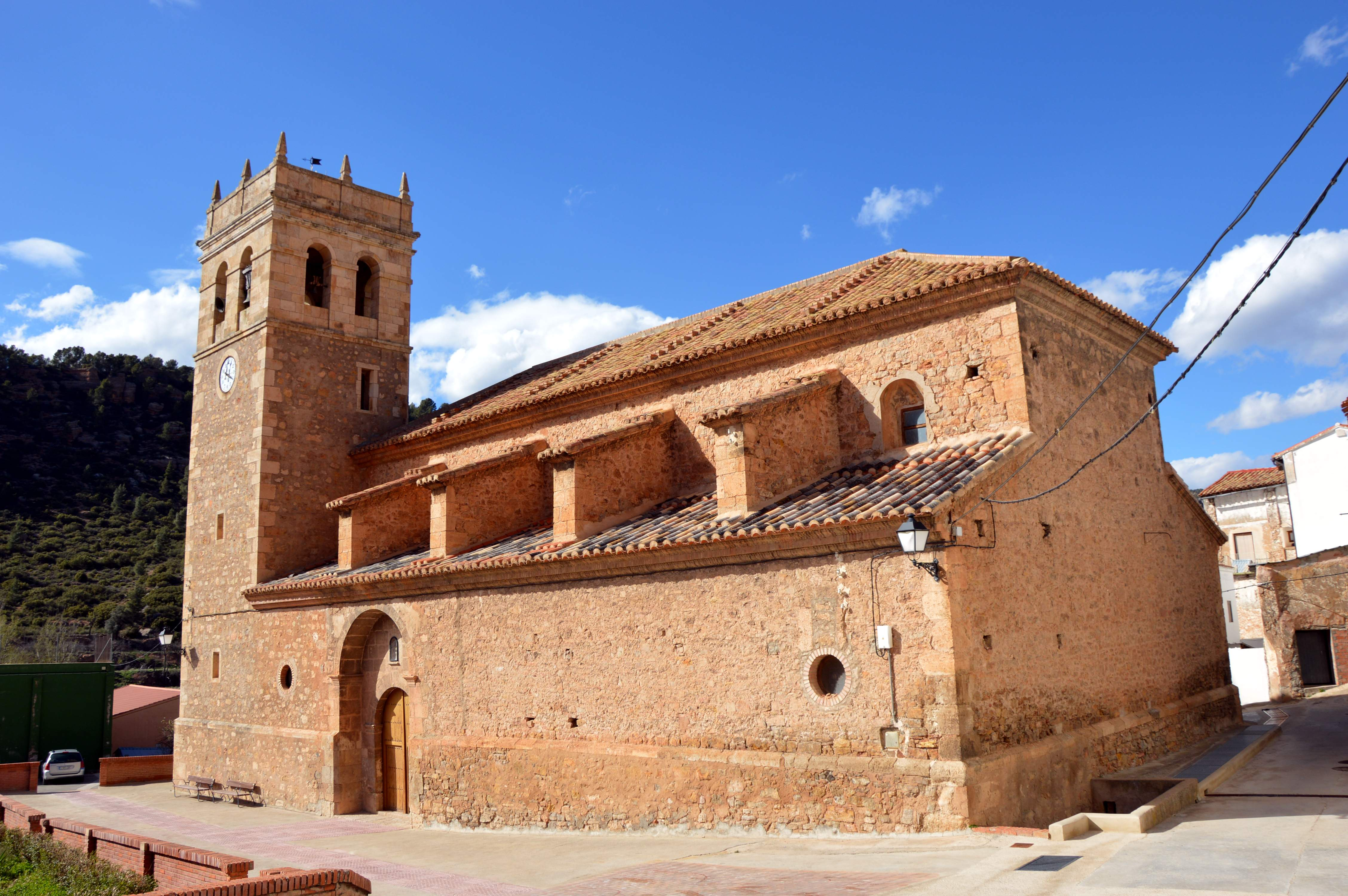 Vista general (suroriental) de la iglesia parroquial de Tramacastiel (Teruel), desde la calle del Chorro.